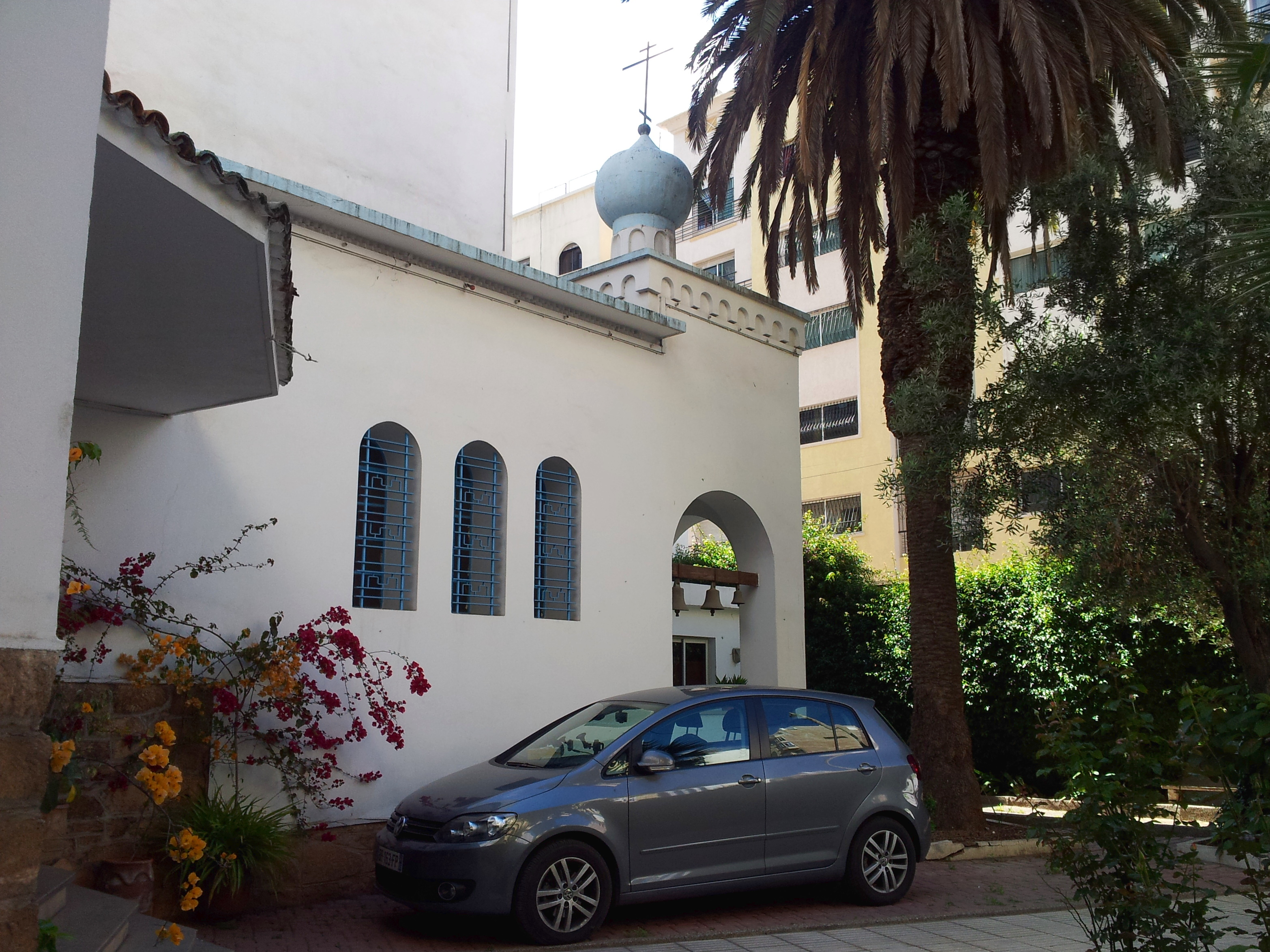 La vue extérieure de l'église orthodoxe russe à Casablanca (13, rue de Blida) de la cour paroissiale.